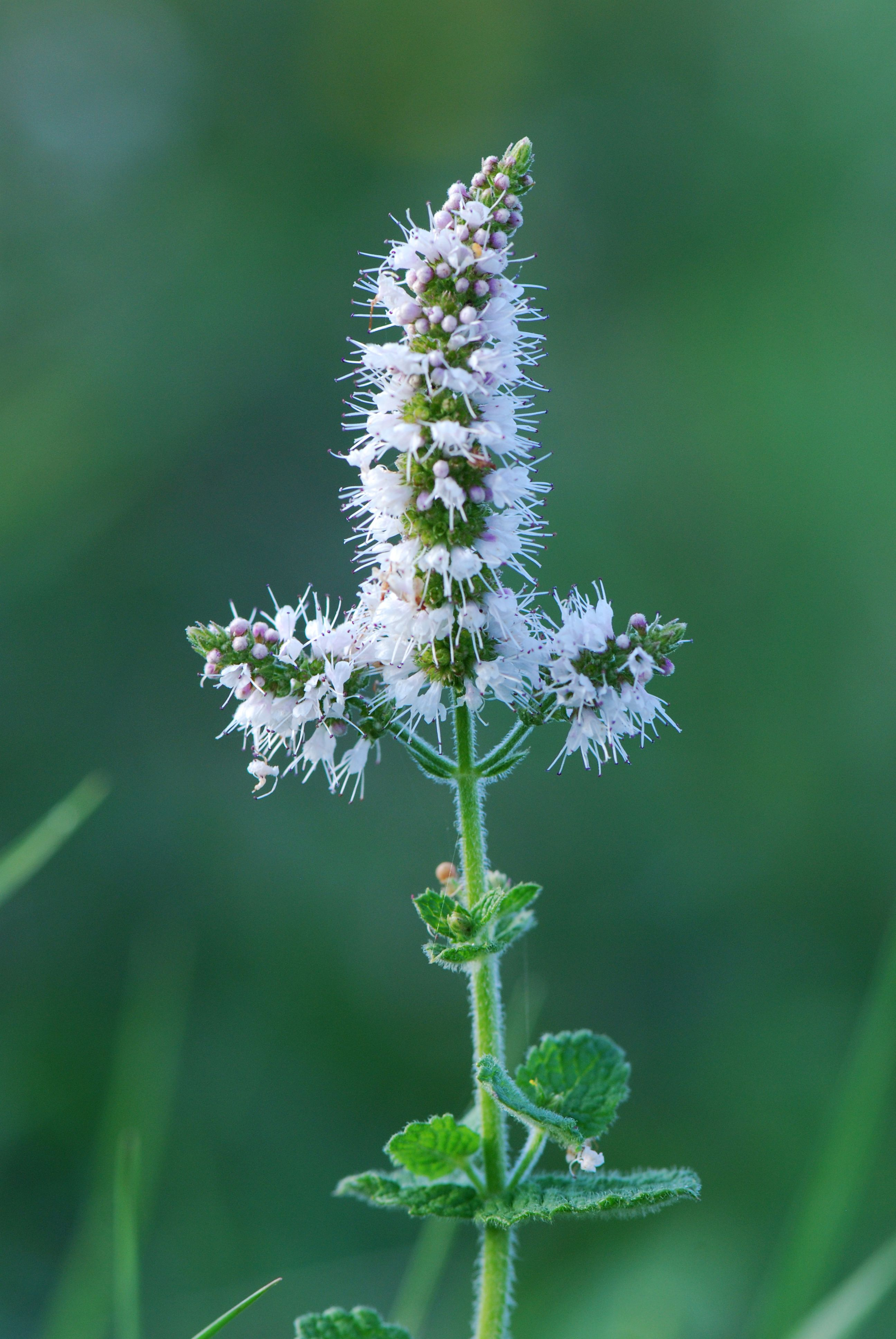 Mentha suaveolens Charente, France